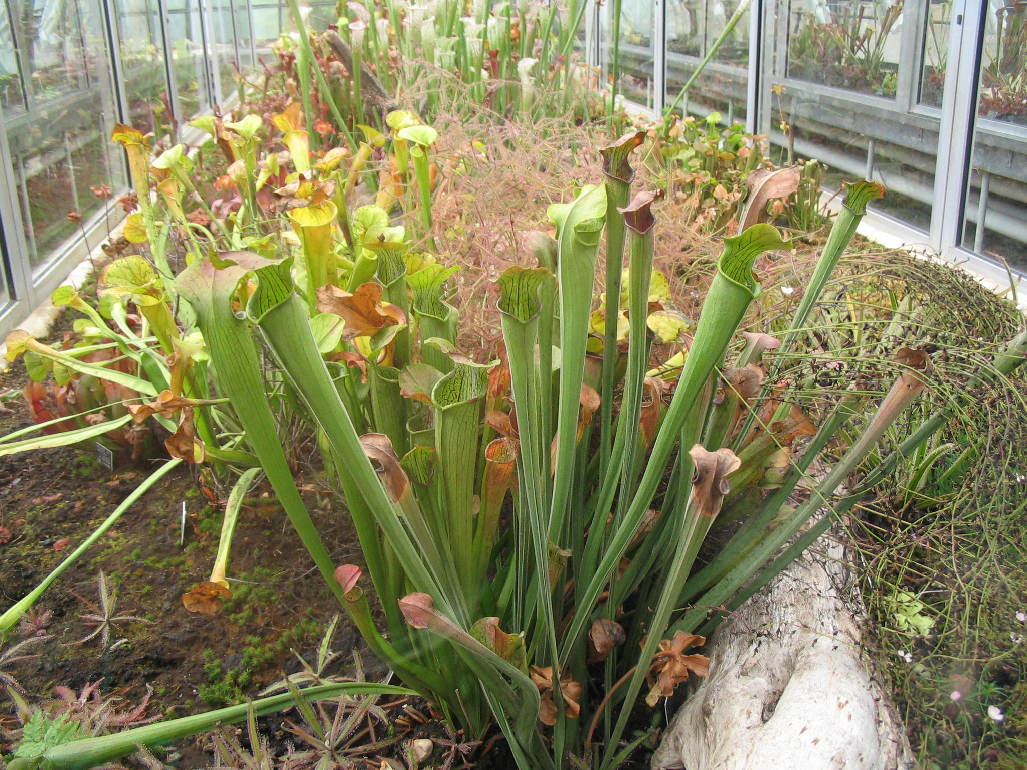 plantes carnivores